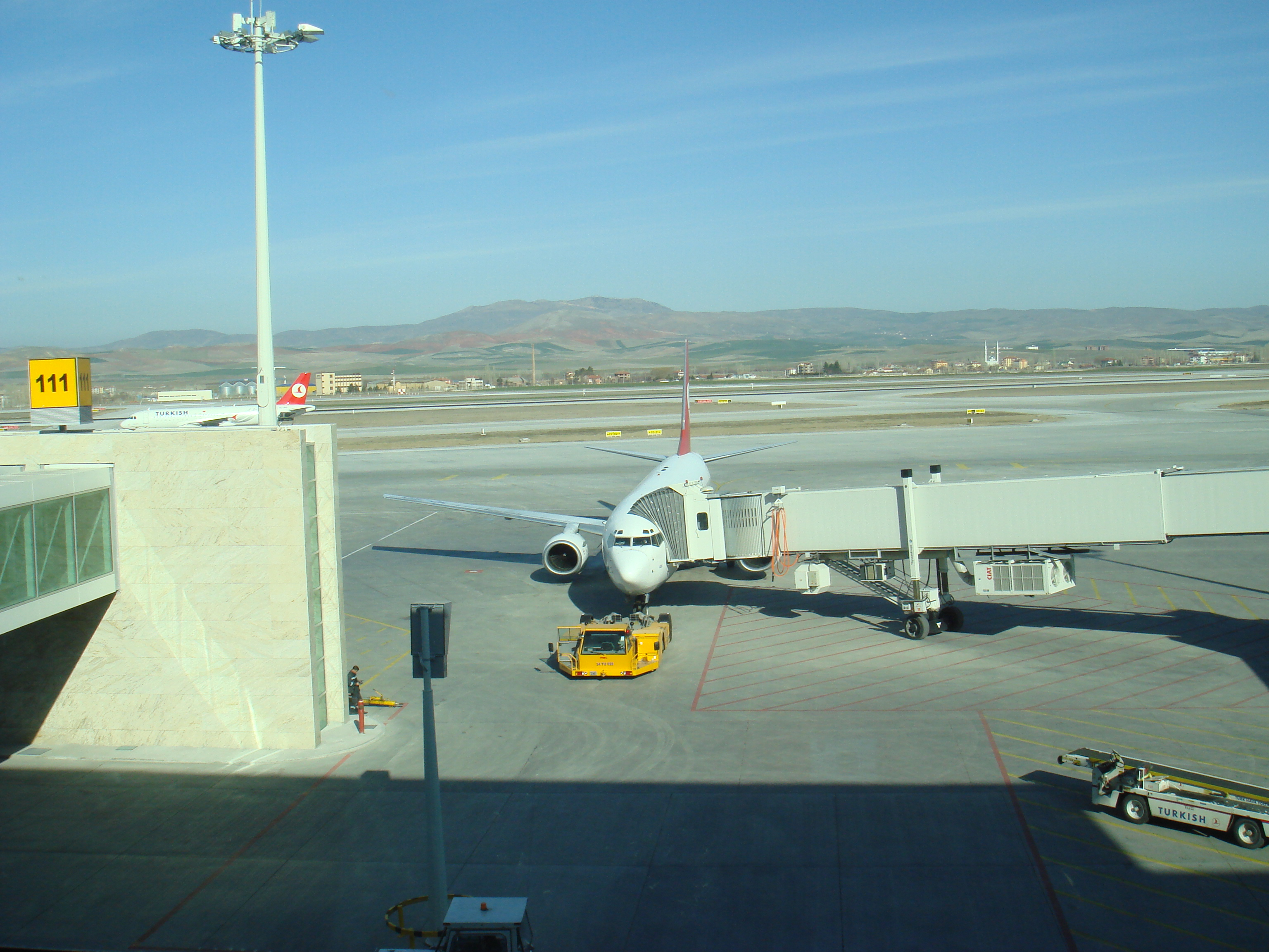 tunnel_to_plane